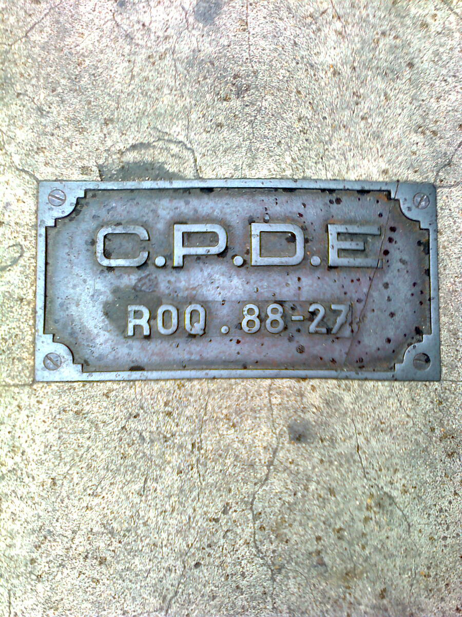 Plaque de trottoir - 42 rue Bréguet (Paris - 11e). Numéro de téléphone : ROQ(ette) 88.27.